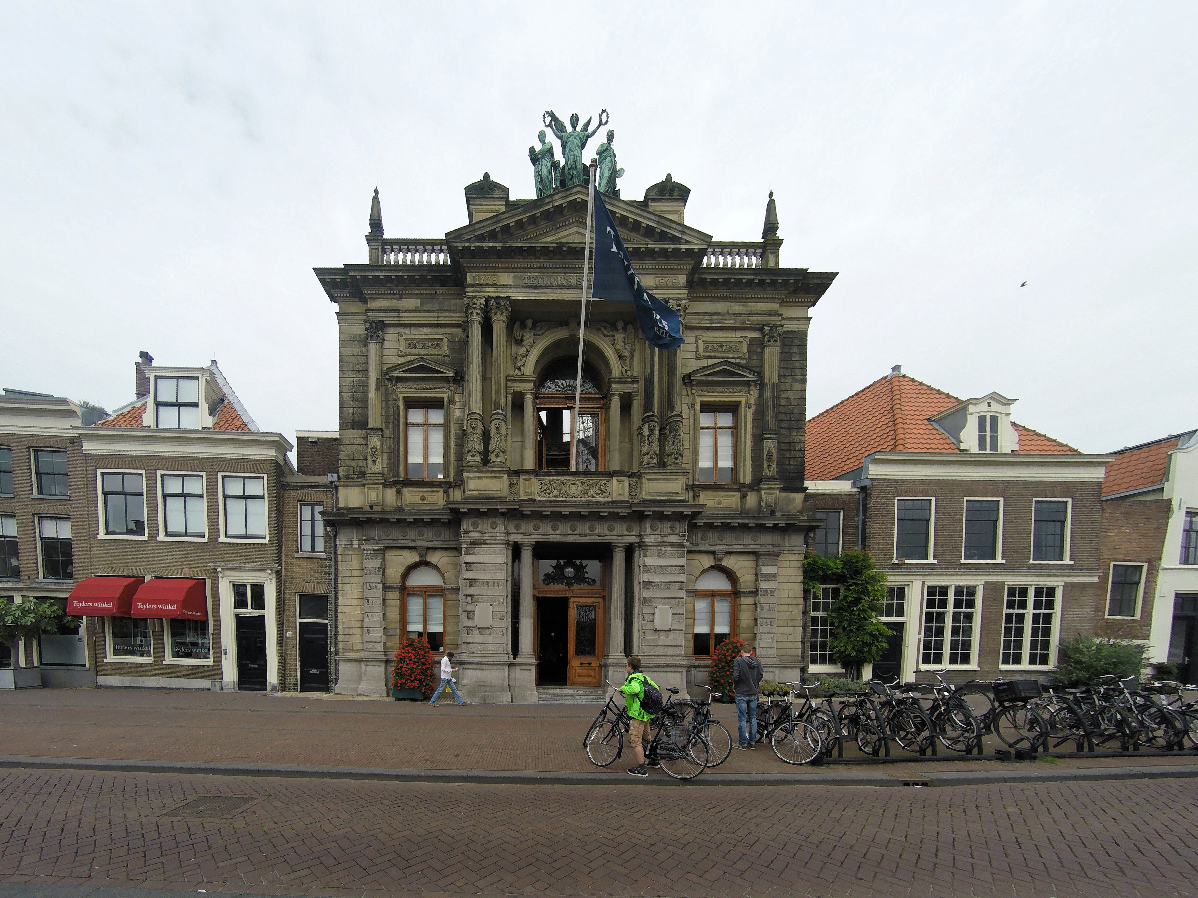 DCIM\100GOPRO\G0020859.